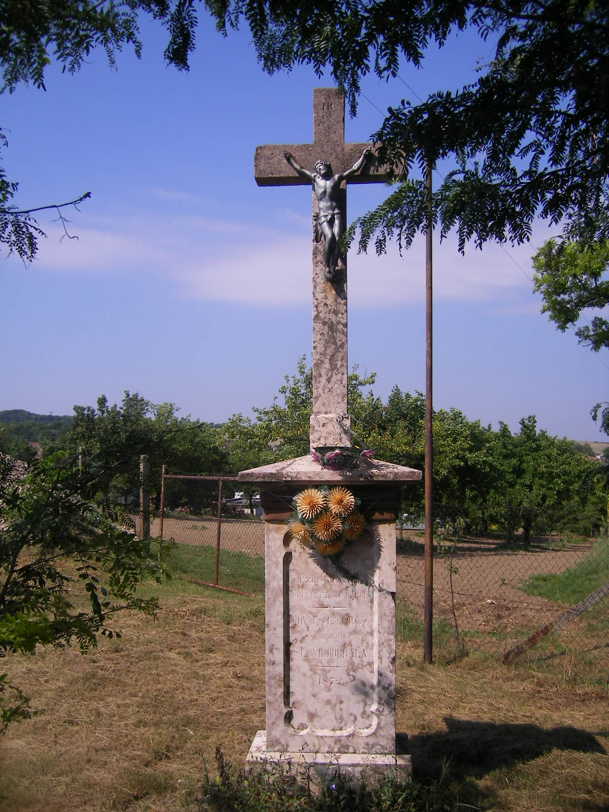 Sárkányfalva - útmenti feszület